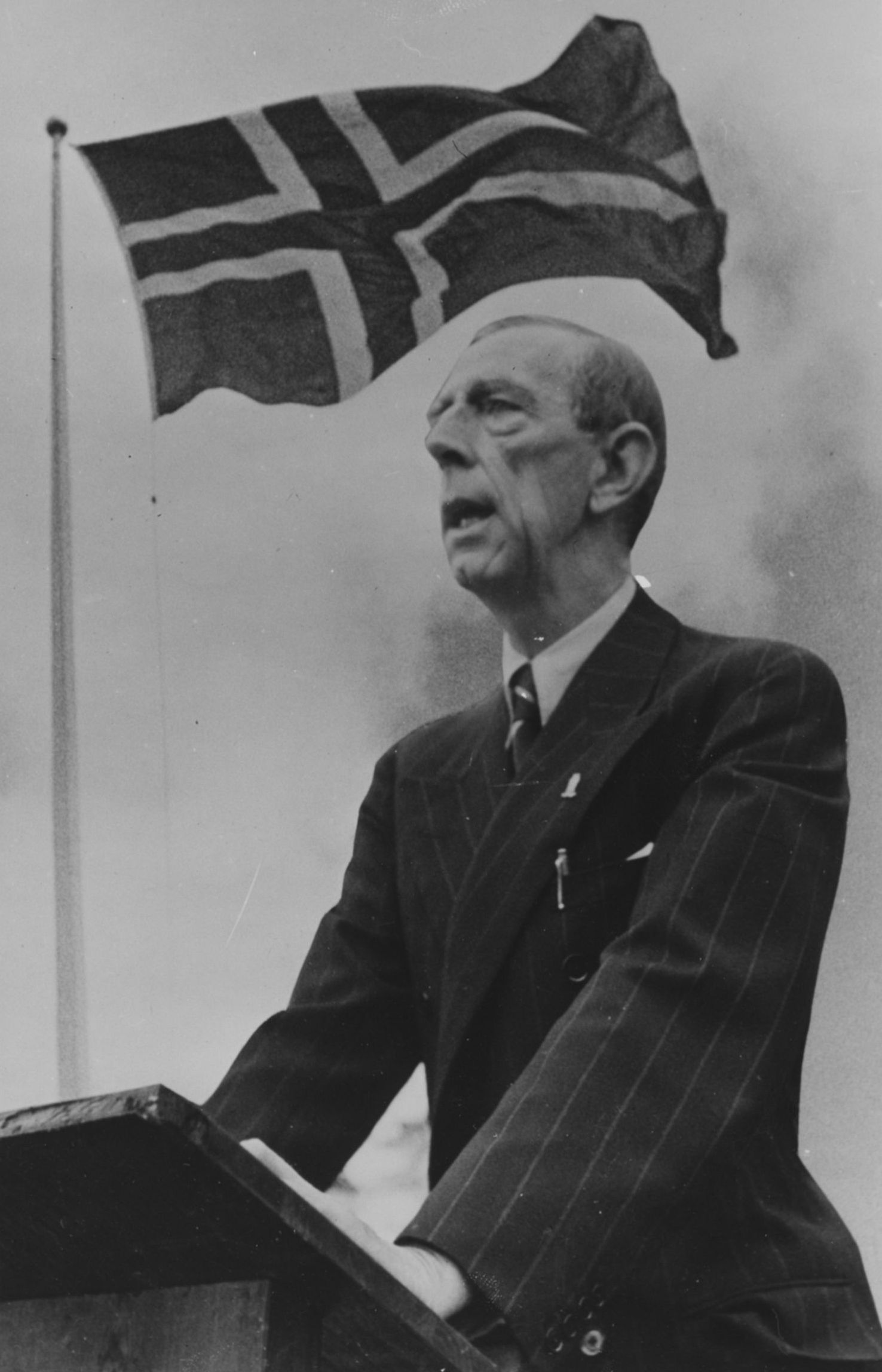 Over hele Sverige feiret man 16. mai som Norges dag. På Skansen i Stockholm var det store festligheter med taler.På bildet ser en prins Wilhelm på talerstolen. RA/PA-1209/Uc/65/1-2/S 1916